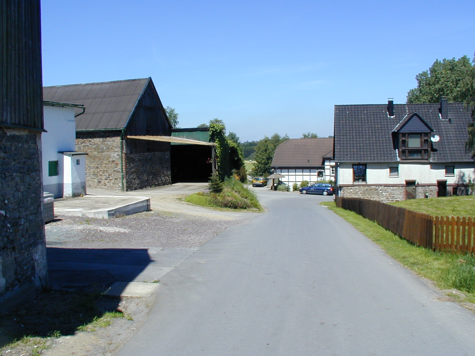 Ansicht in Breckerfeld-Brenscheid